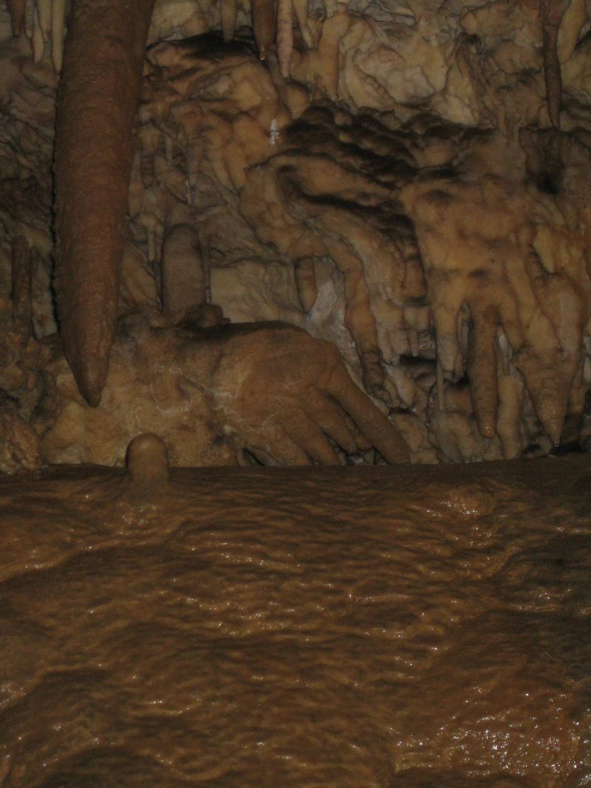 La "main de Tangra", concrétion calcaire célèbre de la grotte de Duhlata (dans le Vitocha)